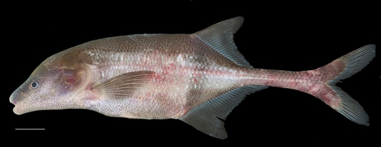 Boulengeromyrus knoepffleri, juvenil, 107 mm SL, río Ivindo, Gabón. Sullivan JP, Lavoué S, Hopkins CD (2016) Cryptomyrus: a new genus of Mormyridae (Teleostei, Osteoglossomorpha) with two new species from Gabon, West-Central Africa. ZooKeys 561: 117-150.